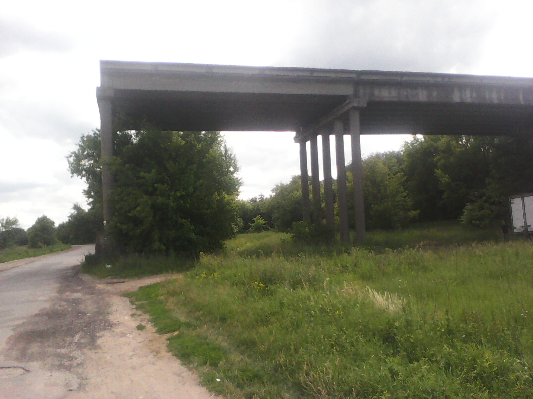 Шварцевский мост